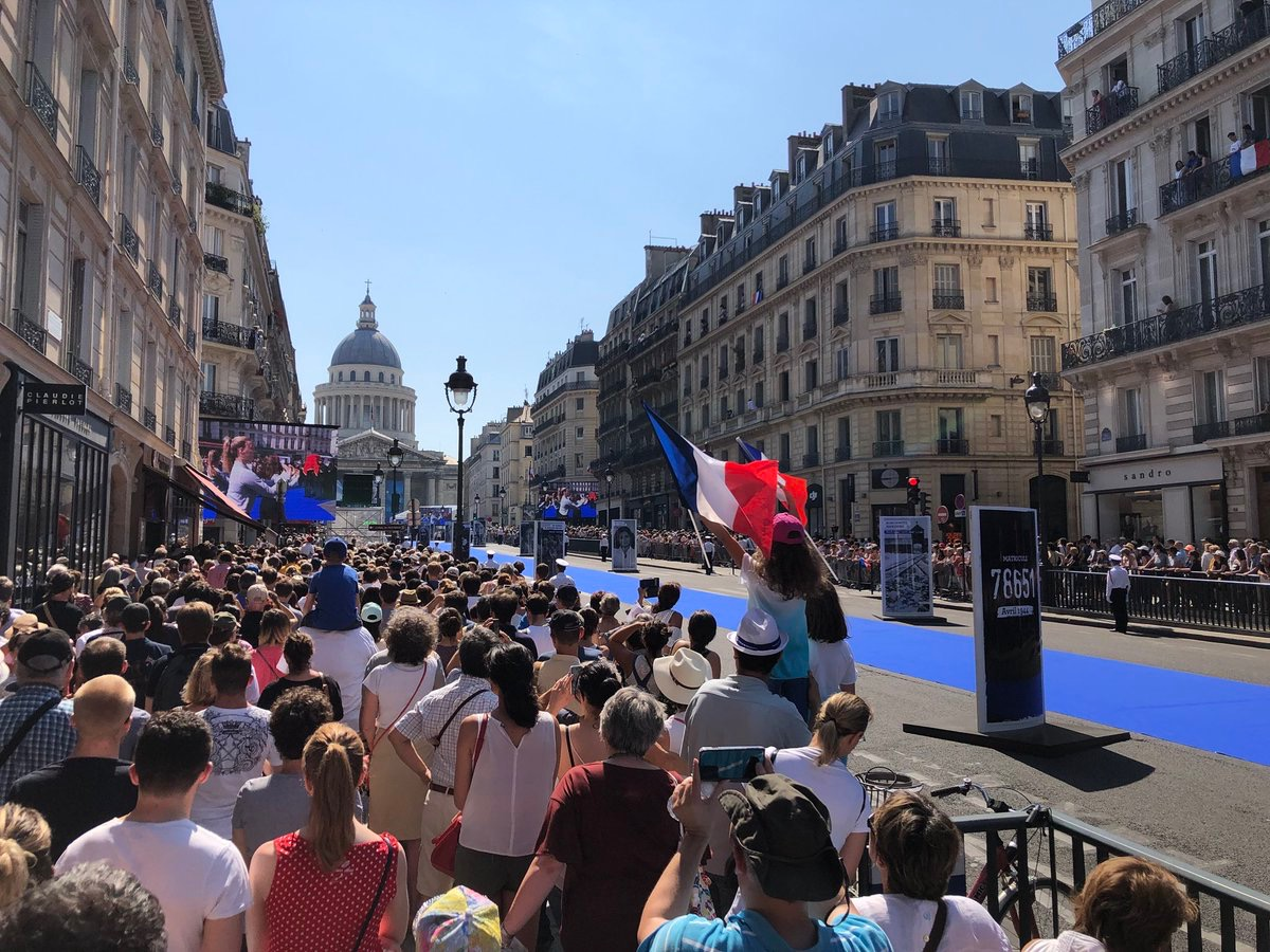 Hommage de la Nation à Madame Simone Veil, Paris-France 2017